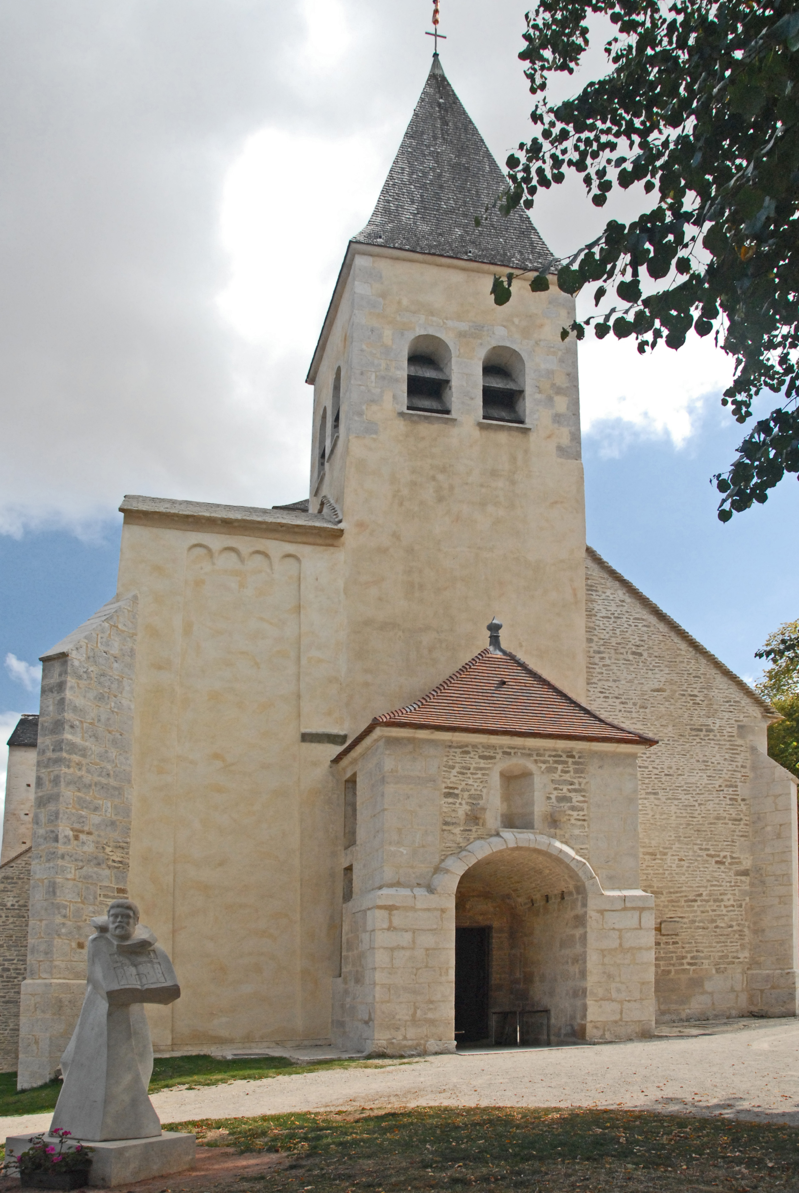 St-Vorles de Châtillon-sur-Seine, "Westbau" von SW